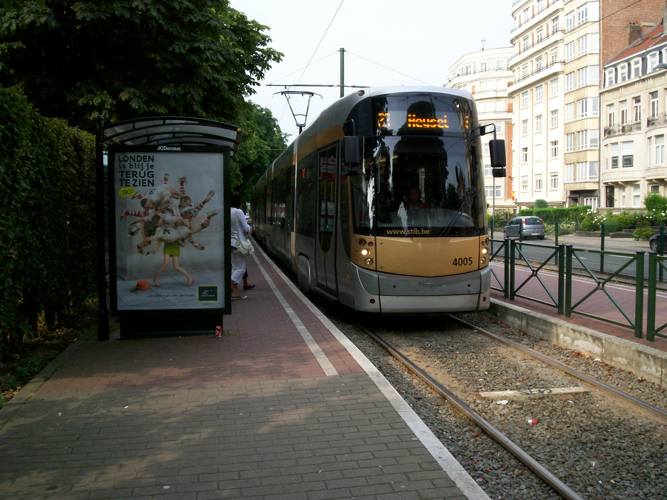 T 4000 de la ligne 23 à Pétillon et à destination du Heysel